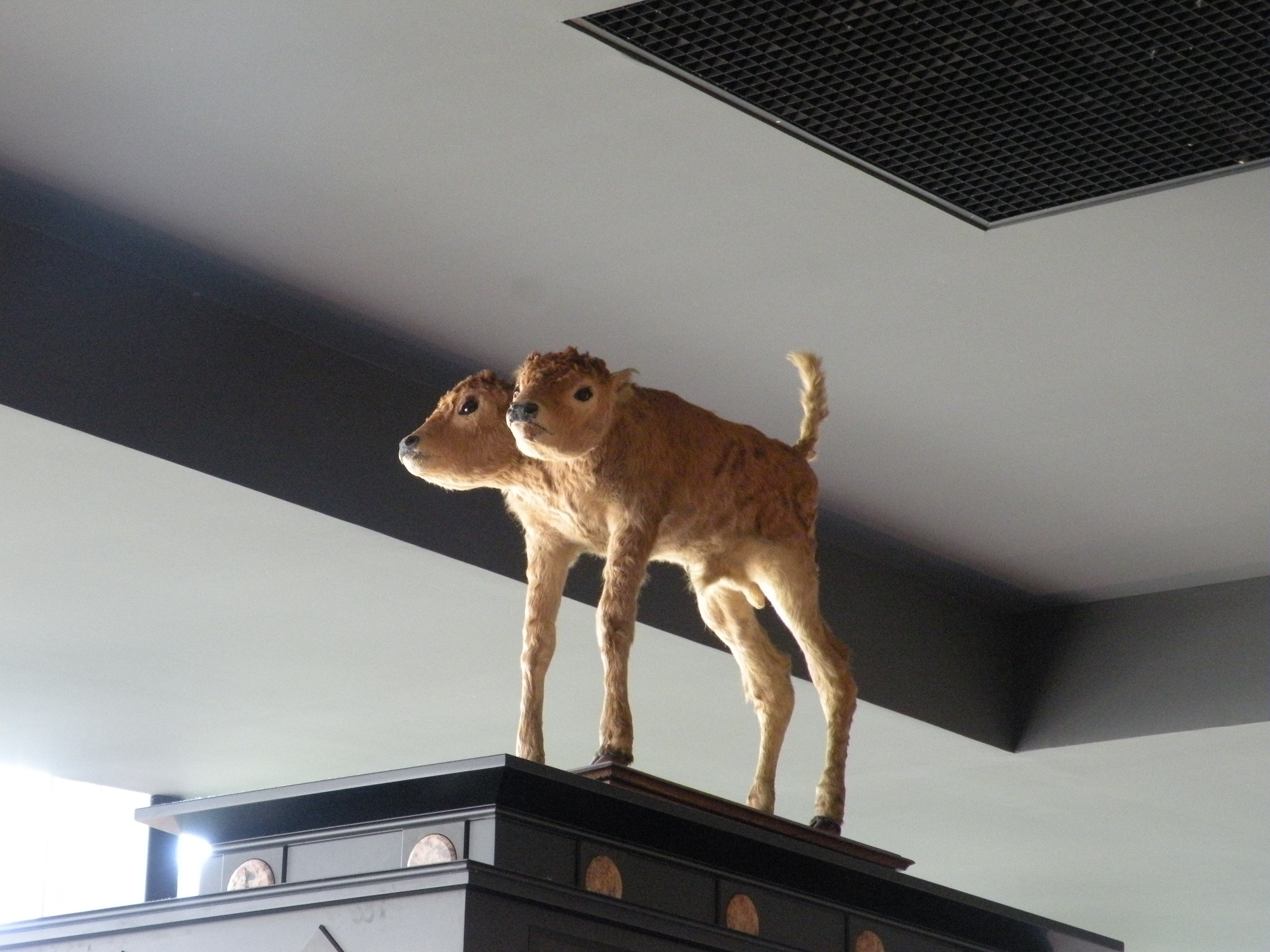 collection du Musée Bernard d'Agesci